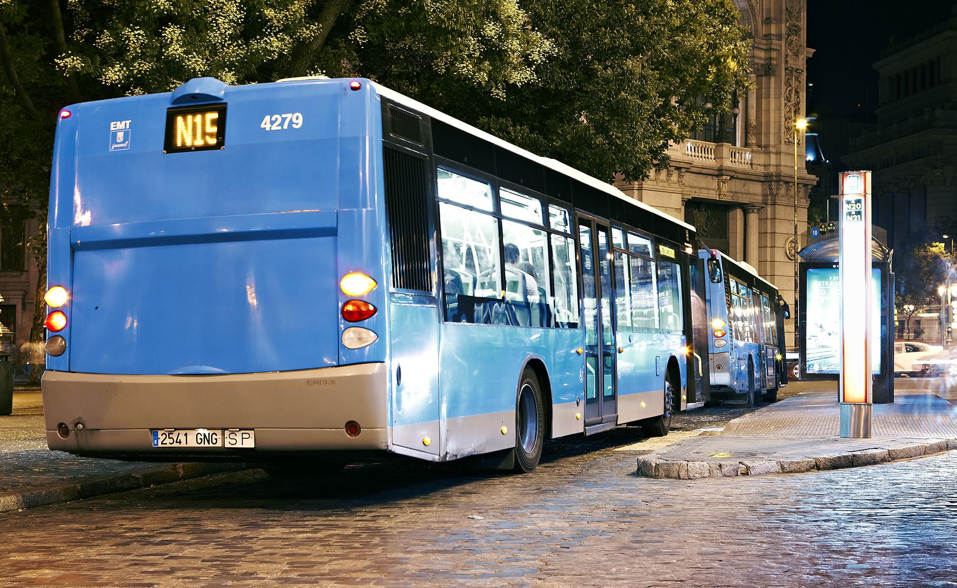 La Empresa Municipal de Transportes de Madrid ha previsto un dispositivo de refuerzo especial de sus líneas de autobuses nocturnos ante la demanda de viajeros que se va a producir entre los días 5 y 10 de diciembre, fechas en las que Madrid suele recibir un elevado número de visitantes por el Puente de la Constitución y la festividad de La Inmaculada.